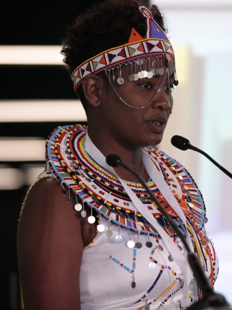 La violencia de género es uno de los problemas sociales más graves de nuestro tiempo. Trabajar desde los gobiernos en una nueva estructura que aborde cuestiones como la educación o la revisión de las políticas jurídicas es básico para erradicar esta violencia, tal y como han puesto de manifiesto los ponentes de la mesa de Violencia de Género, celebrada hoy en el marco del I Foro Mundial sobre Violencias Urbanas y Educación para la Convivencia y la Paz, que ha moderado Emilia Sáiz, del Secretariado Mundial del CGLU.